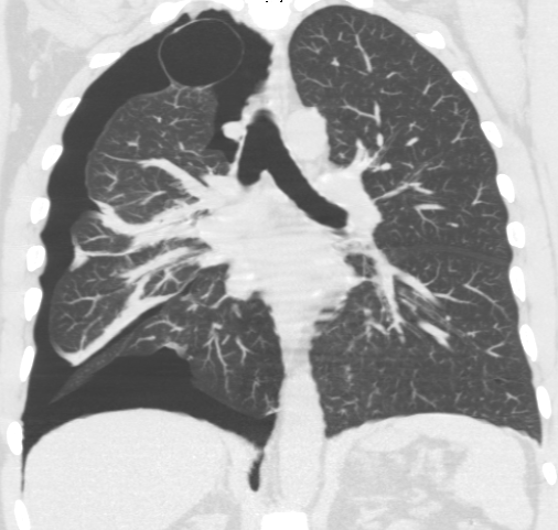 Corte tomográfico coronal evidenciando pneumotórax a direita e presença de bolha enfisematosa em ápice pulmonar, com aderência apical.